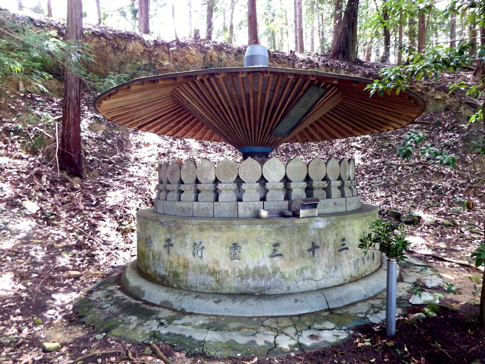 明王院の西国三十三の写し